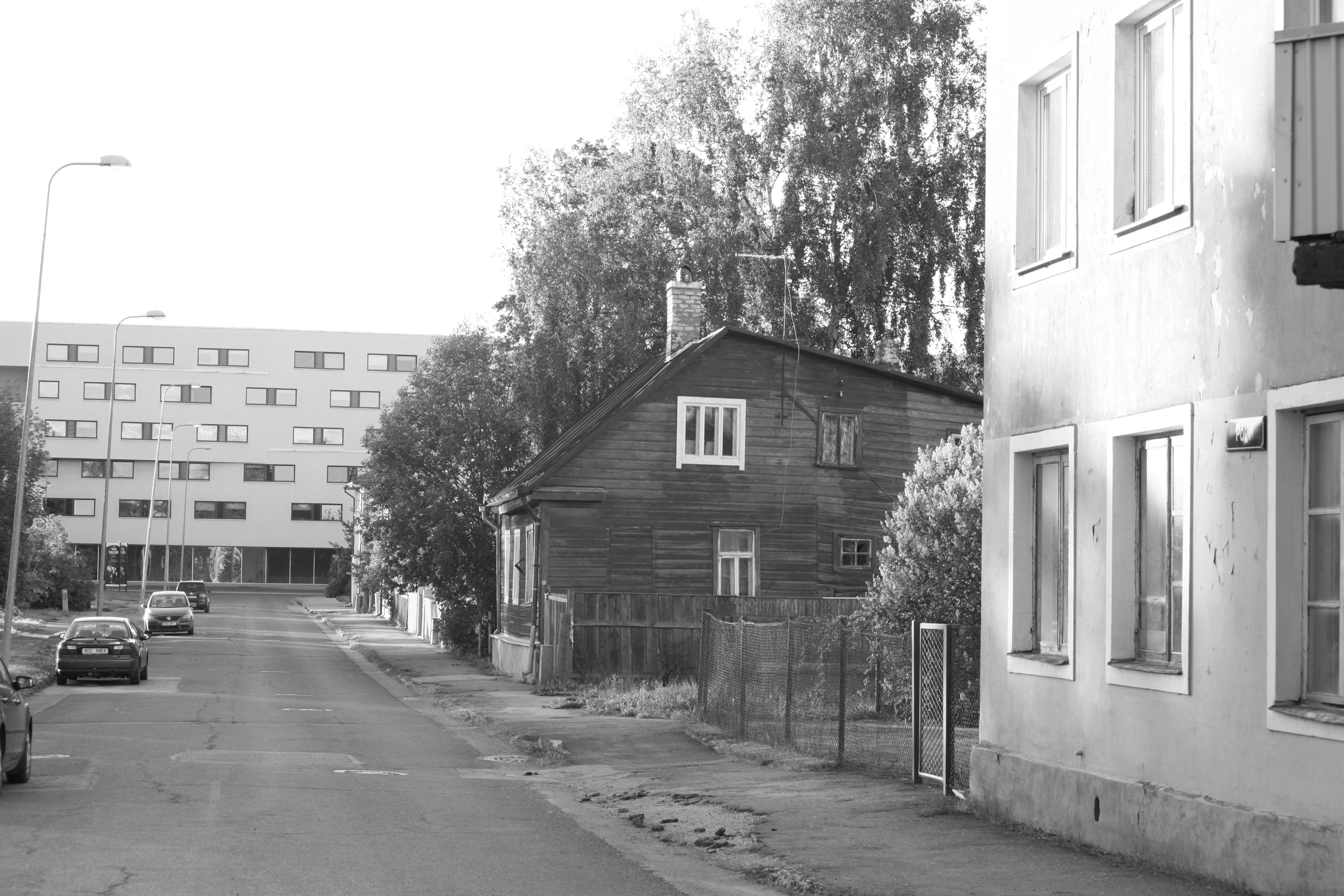 Põik tänav, 16.06.2015